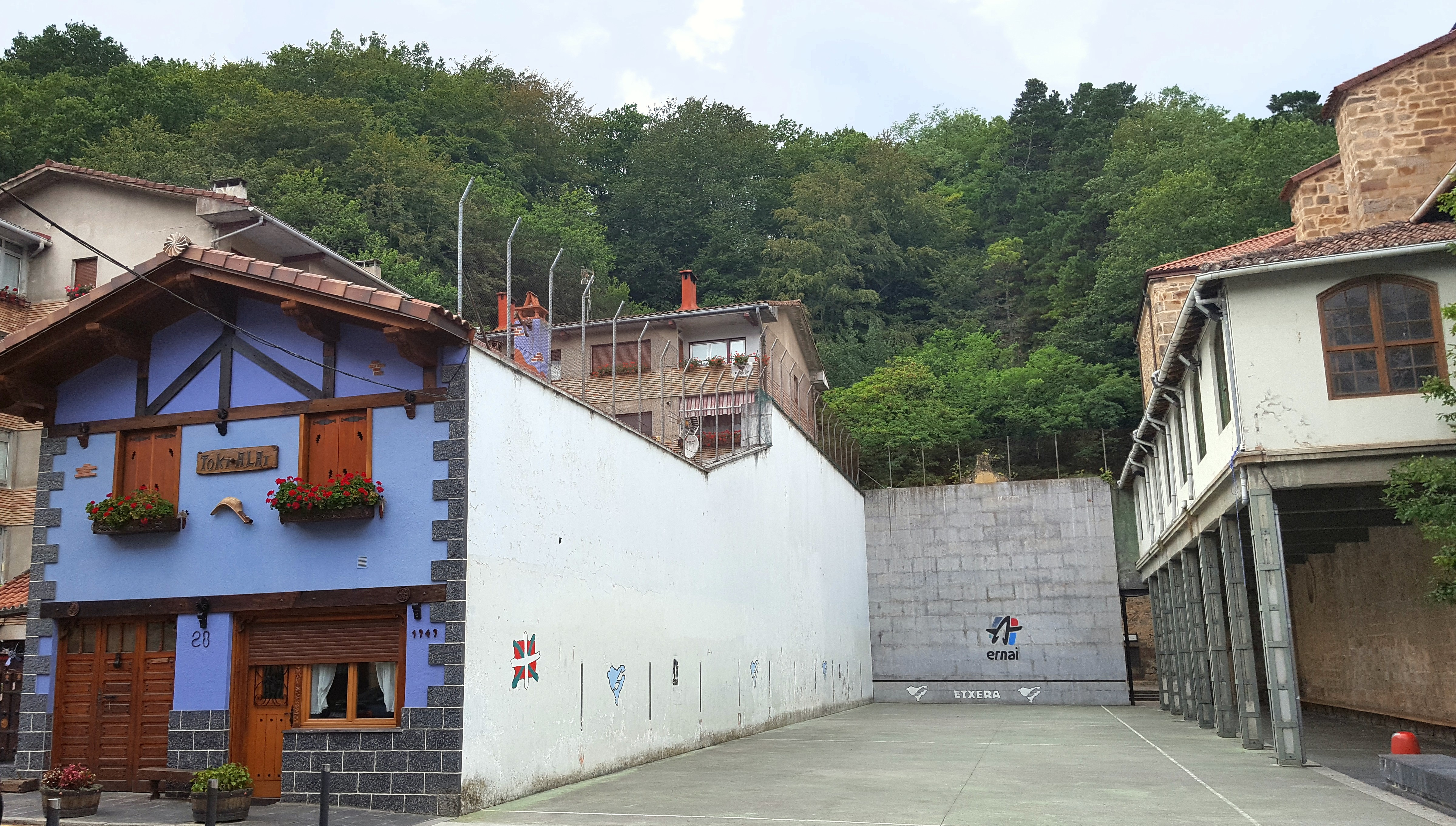 Zaldibia herriko frontoia